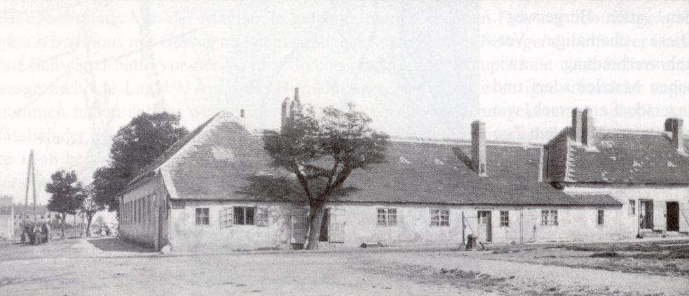 Stoß im Himmel, von der Troststraßen gegen Osten gesehen